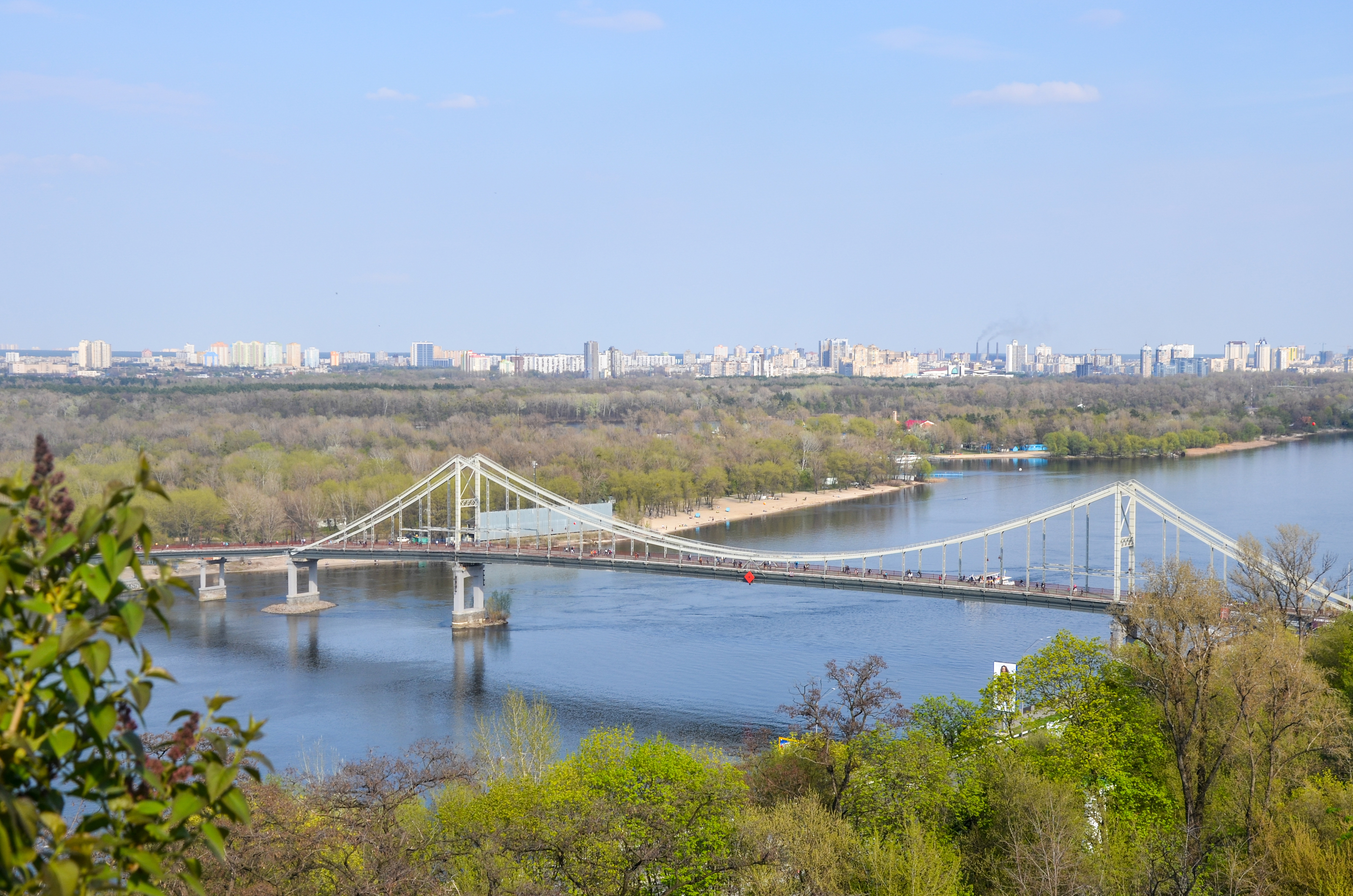 Вид на райони Києва з Володимирської гірки.